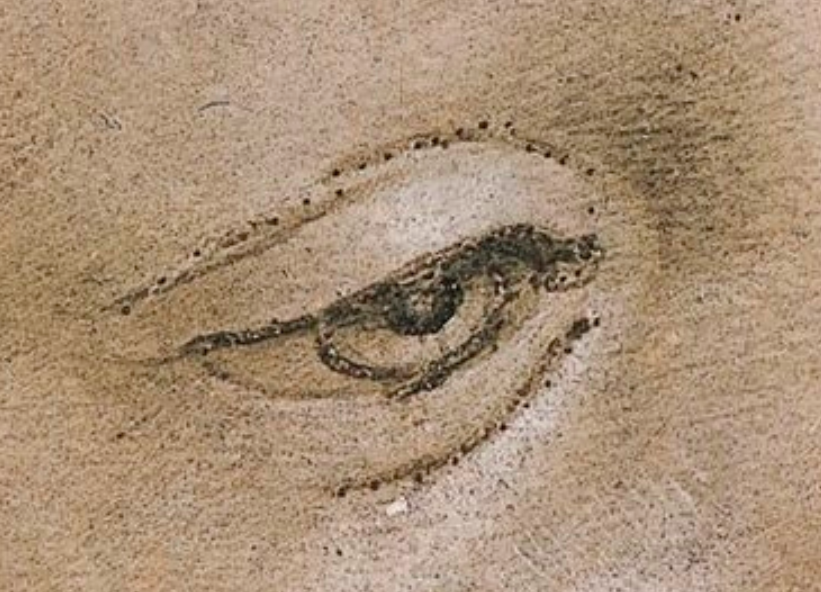 Vue en gros plan d'un œil dessiné sur les contours duquel se trouvent des trous de piqures